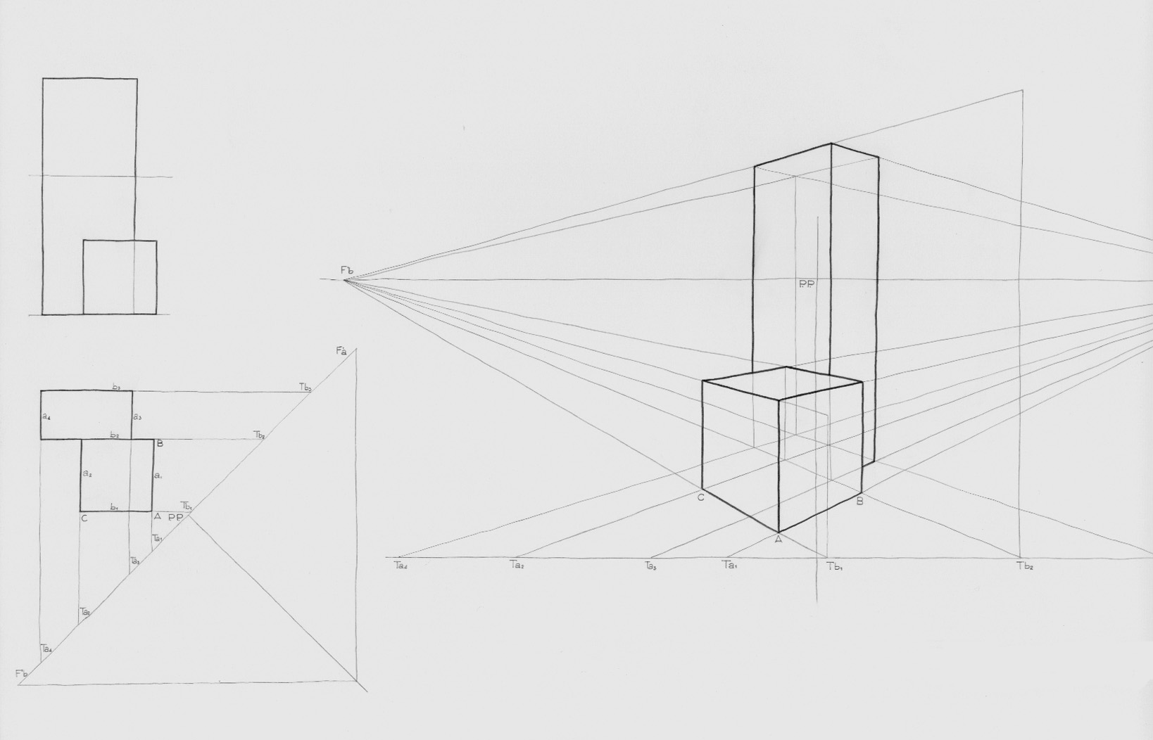 Si tratta di un disegno eseguito a mano libera che illustra sinteticamente come procedere per costruire una prospettiva col metodo dei punti di fug. Il file è stato creato scandendo il disegno con uno scanner.